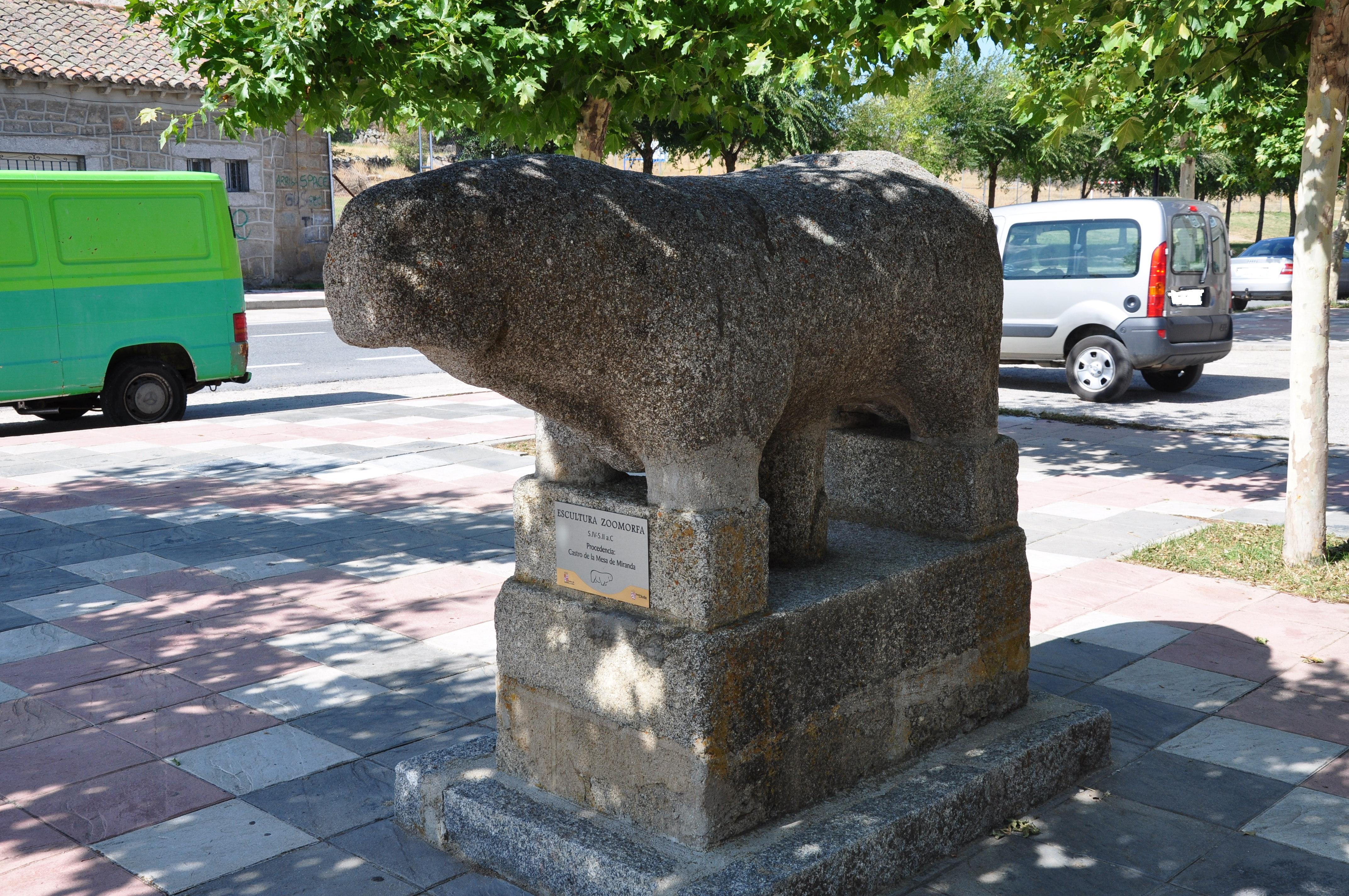 Verraco del castro celta-vetón de la Mesa de Miranda en Chamartín (Ávila), España.